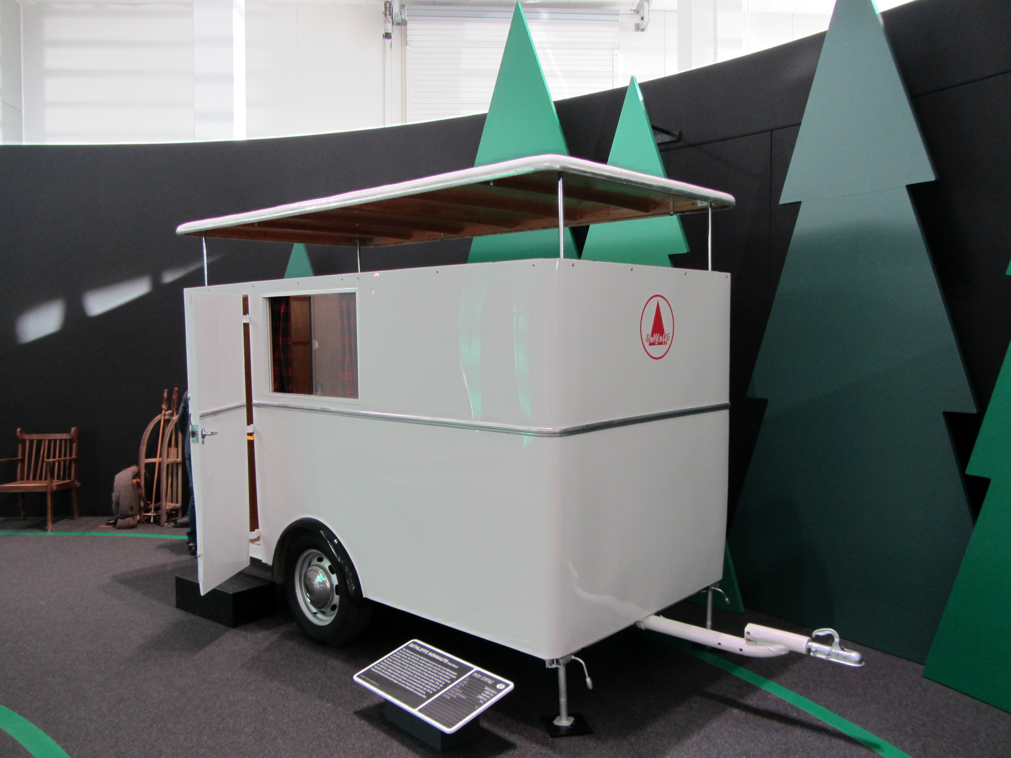 Dethleffs Wohnauto aus dem Jahre 1932 - Erster Wohnwagen Dethleffs und Deutschlands (Nachbau) - Leihgabe Dethleffs